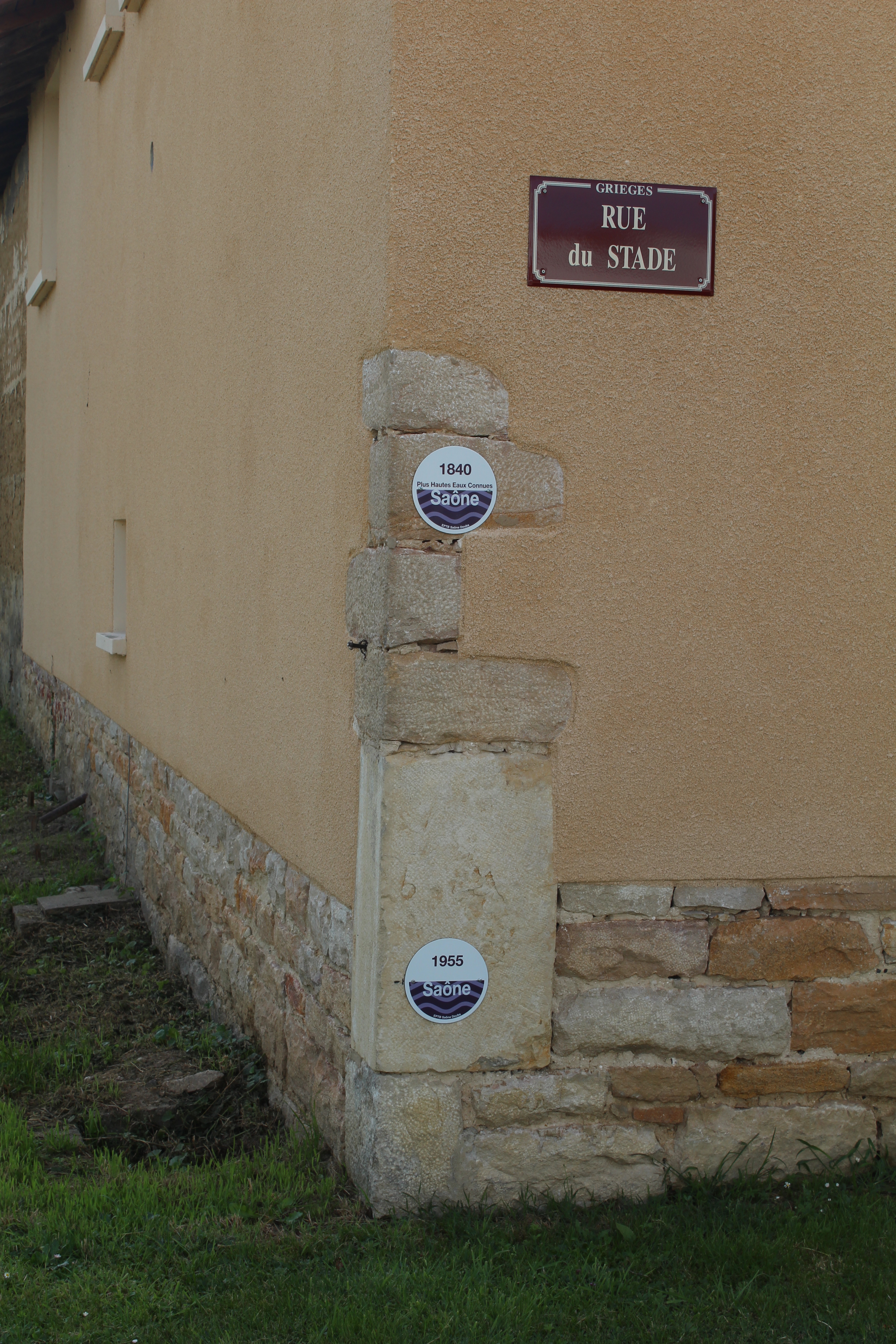 Indication sur les niveaux de la Saône durant les grandes crues à Grièges.